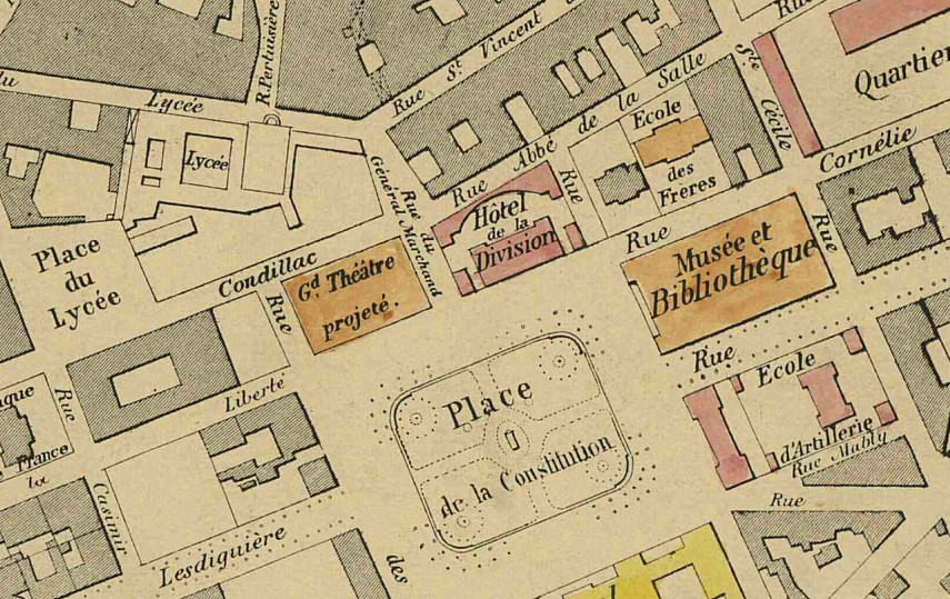 Plan de Grenoble 1869. Archives municipales de Grenoble.